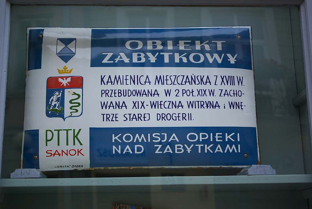 Sklep Jana Hydzika w Sanoku. Tablica obiekt zabytkowy